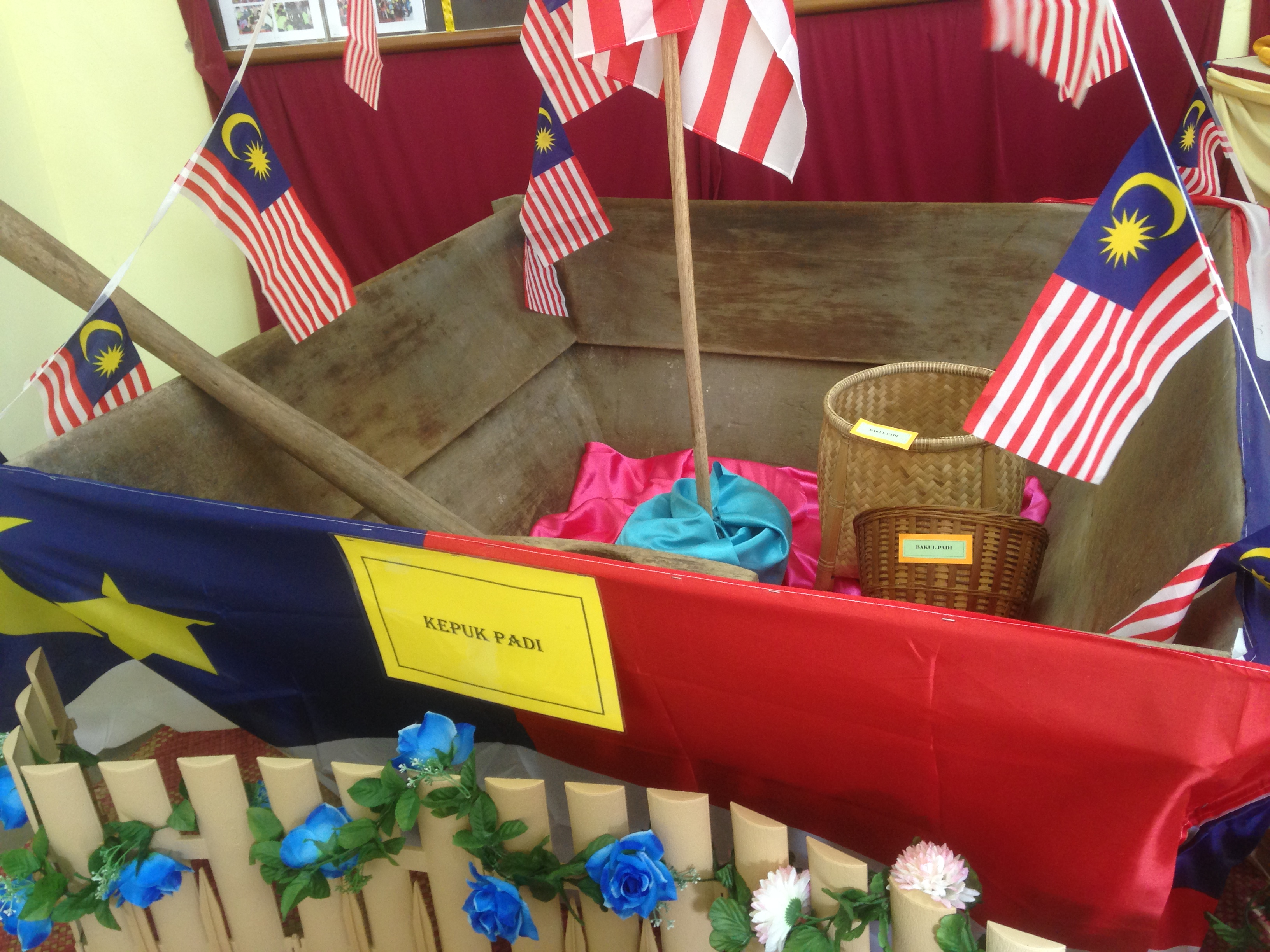 PERALATAN PADI